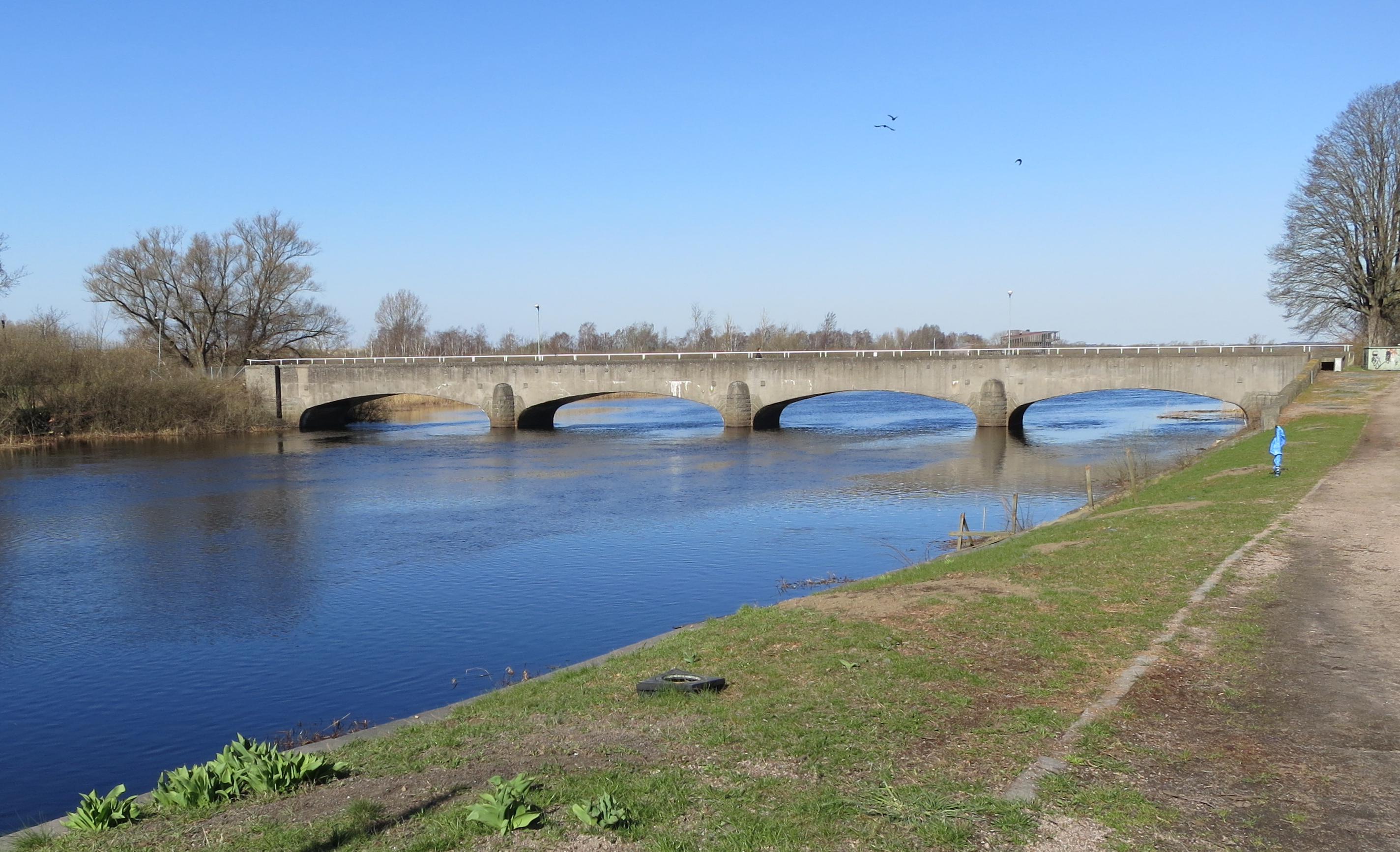 Järnvägsbro över Helge å i Kristianstad